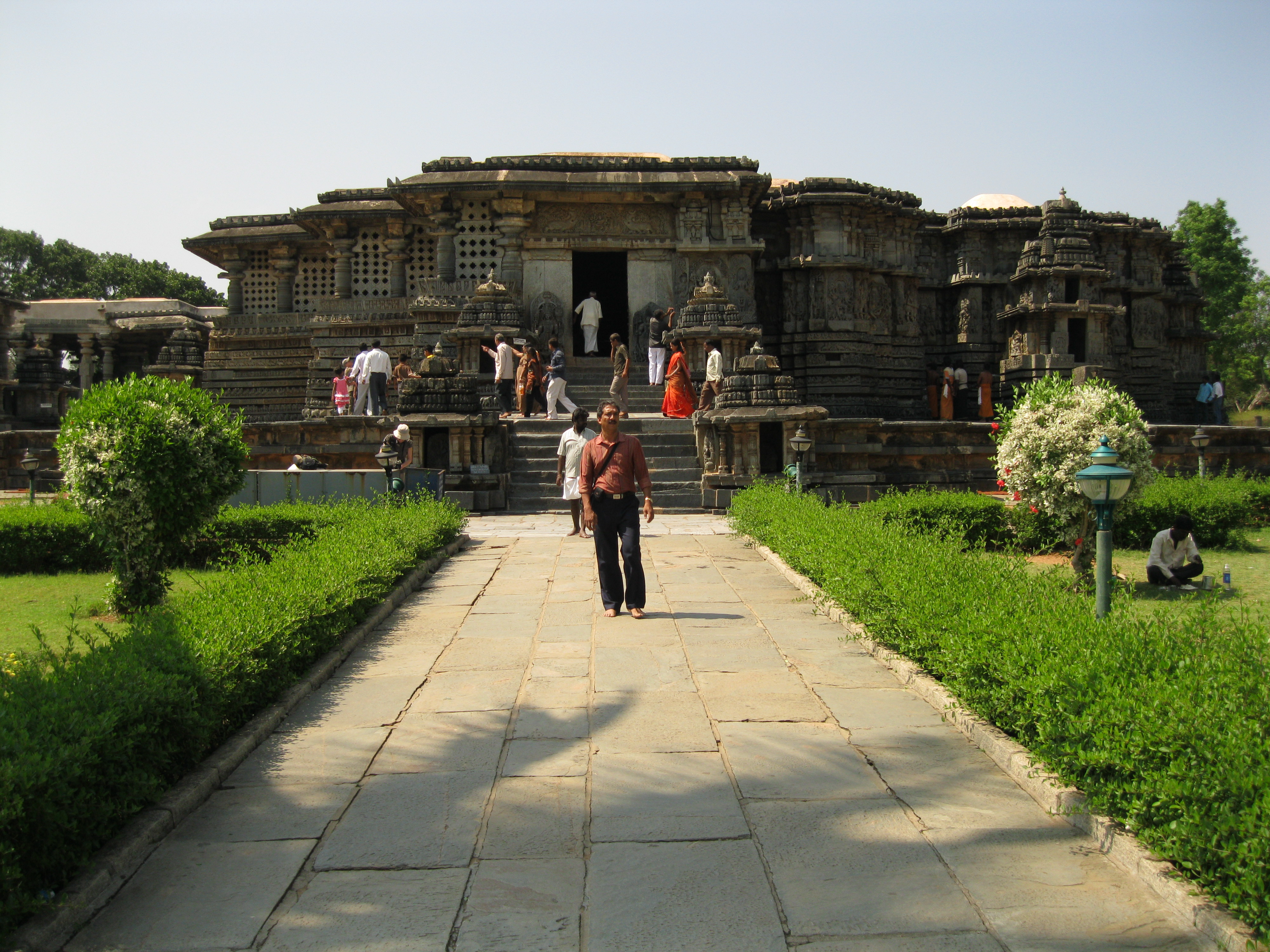 ഹലേബിഡ് ,ദക്ഷിണ കാനറ